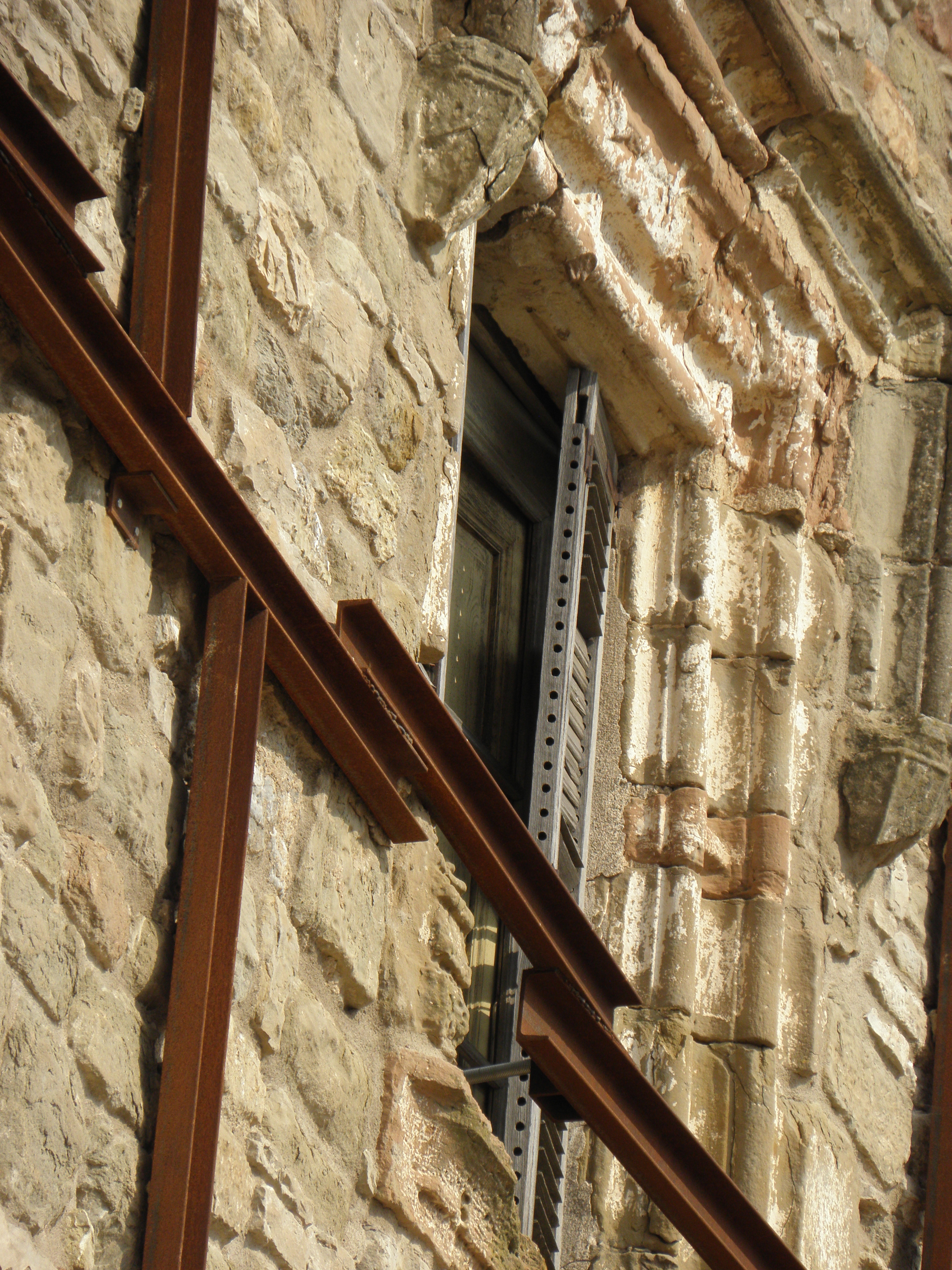 El castell d'Enfesta (municipi de la Molsosa, Solsonès). El finestral de damunt del portal d'accès al castell.